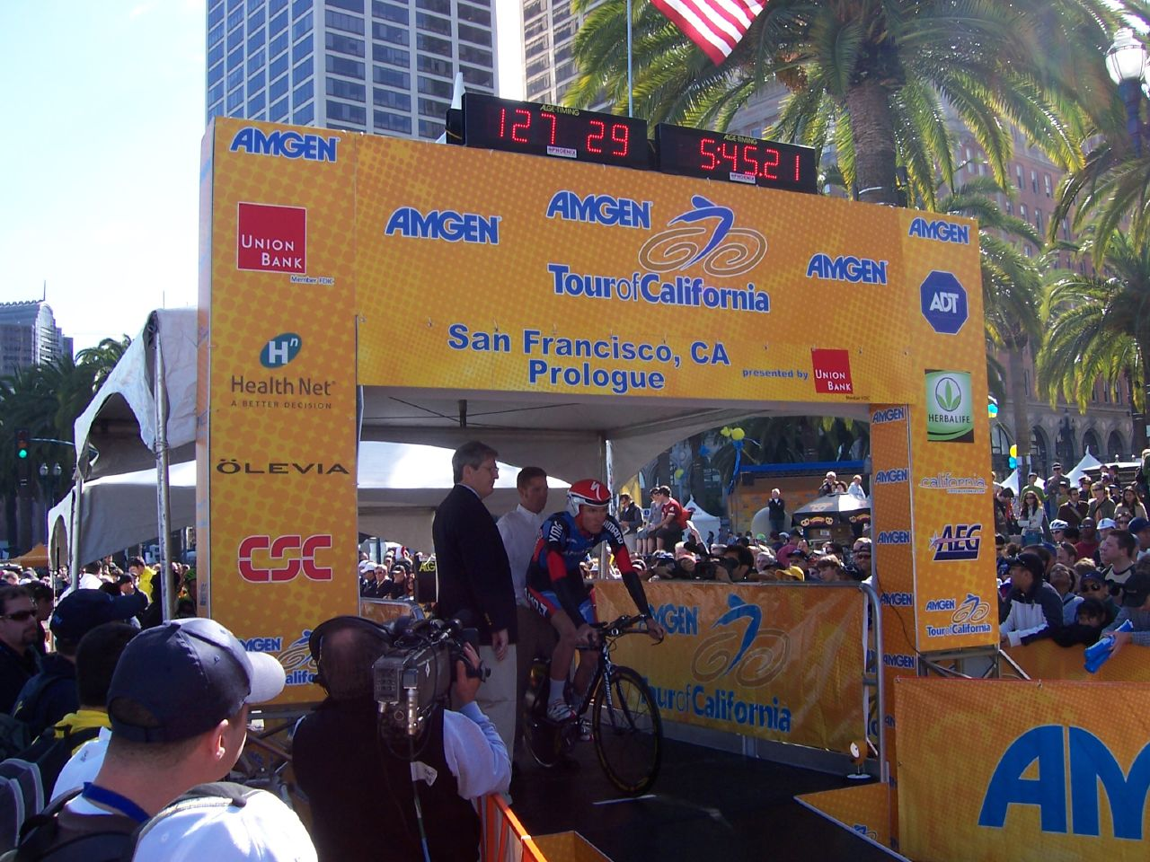 Amgen als Sponsor der Tour of California